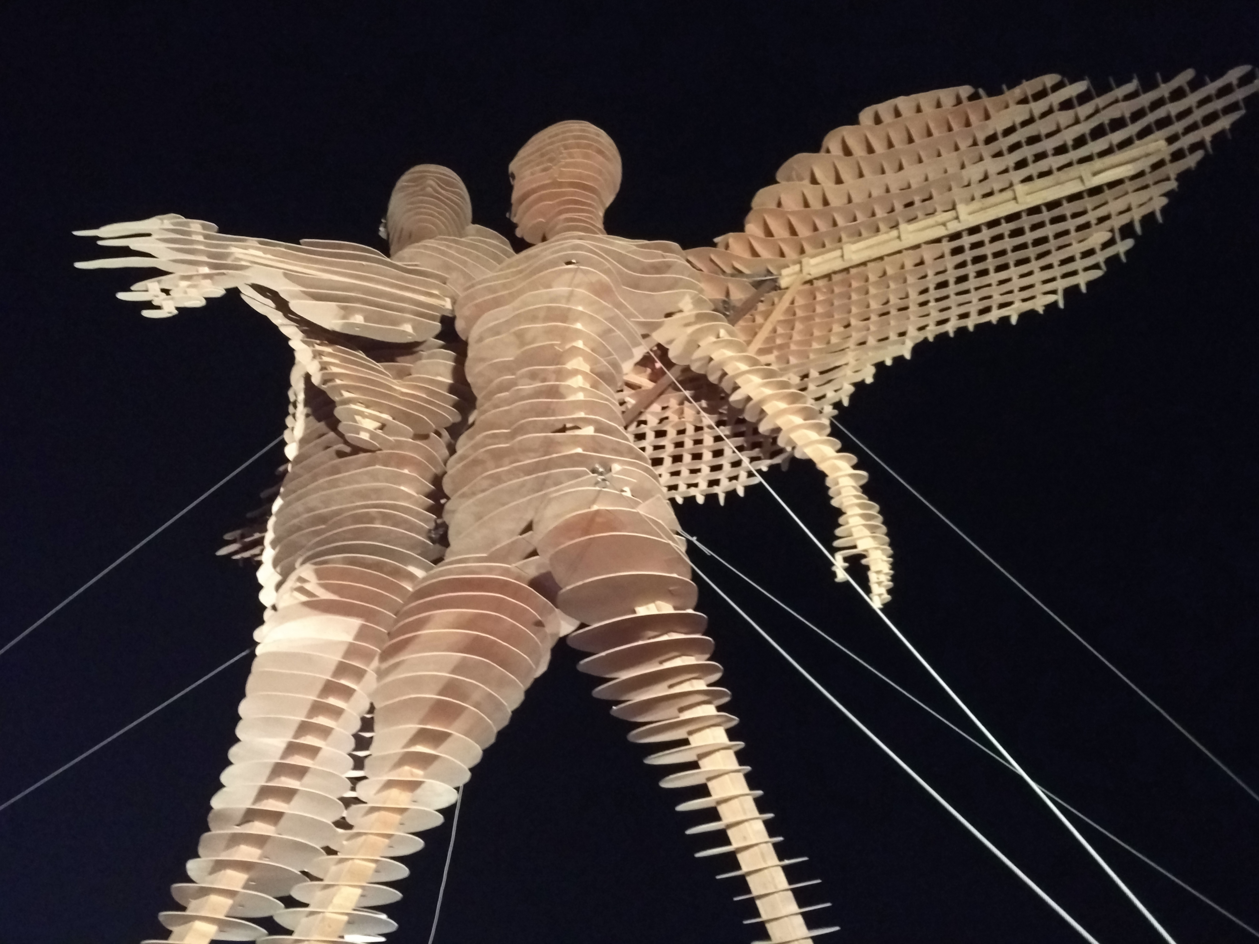 האפיג'י (דמות העץ) המוצבת המרכז הפלאייה במידברן 2017